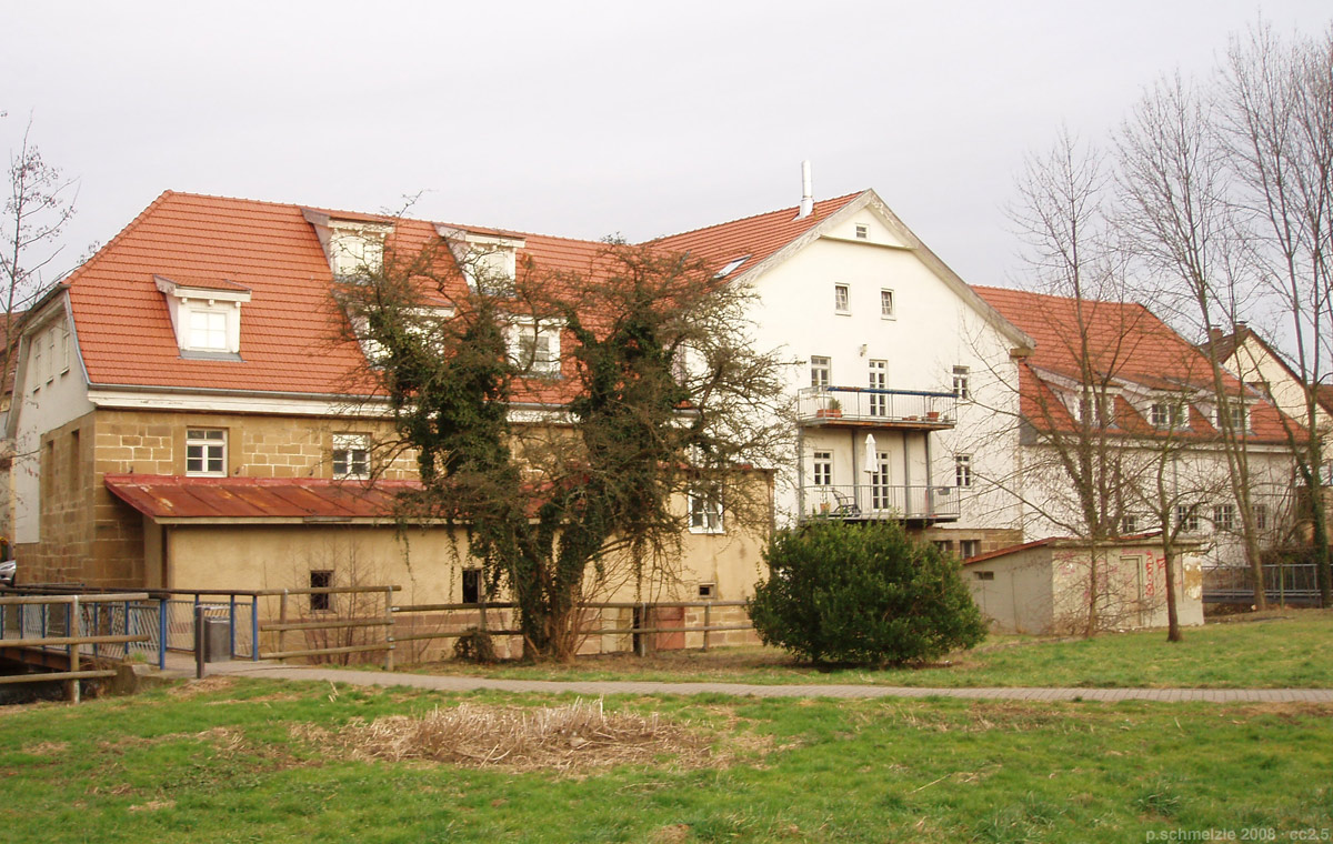 Ludwig'sche Mühle in Heilbronn-Neckargartach